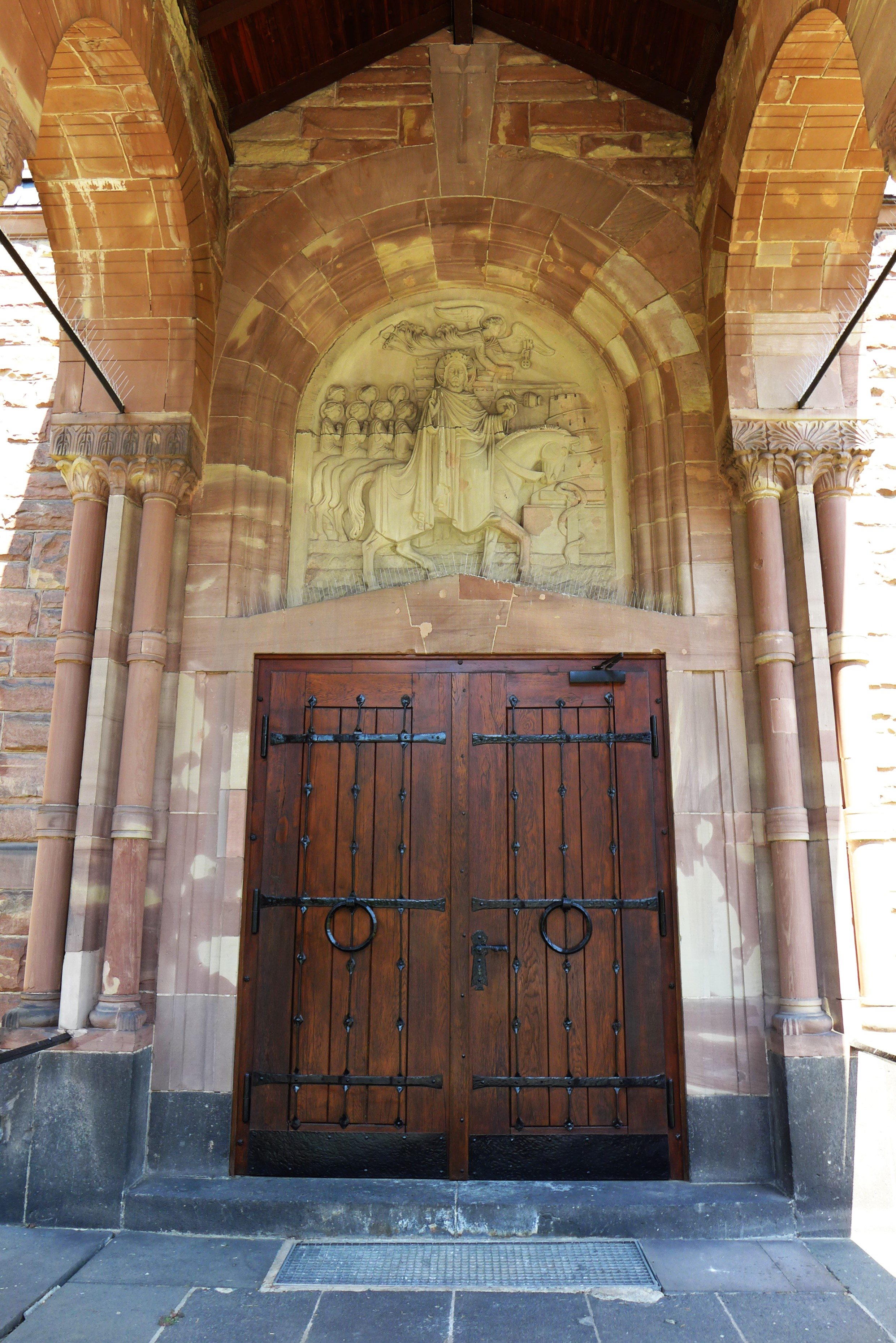 Christkönig-Kirche (Saarbrücken), Seitenportal mit Relief des apokalyptische Einzuges Christi ins himmlische Jerusalem